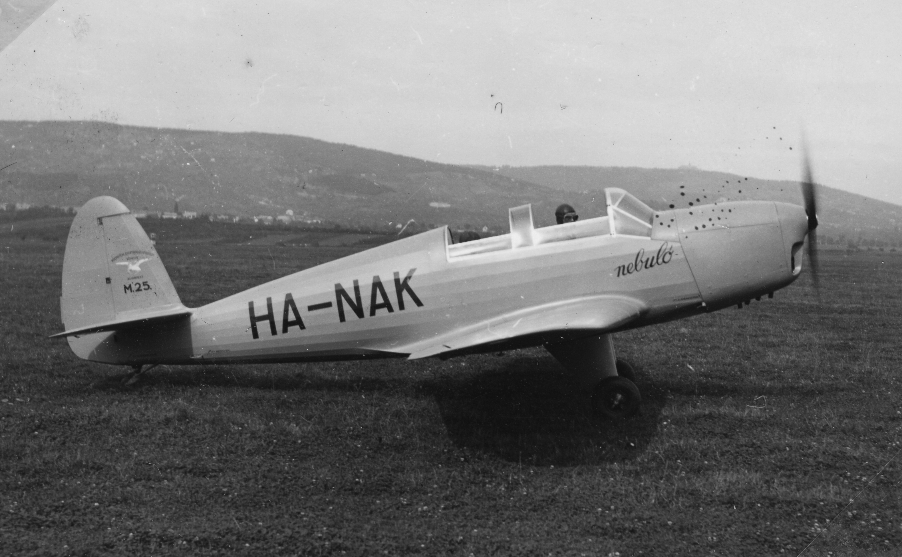 M-25 "Nebuló" sportrepülőgép. Location: Hungary, Budapest XI., Budaörs Airport Tags: airplane, airport, transport, Hungarian brand, MÁVAG-brand, Budapest Title: M-25 \